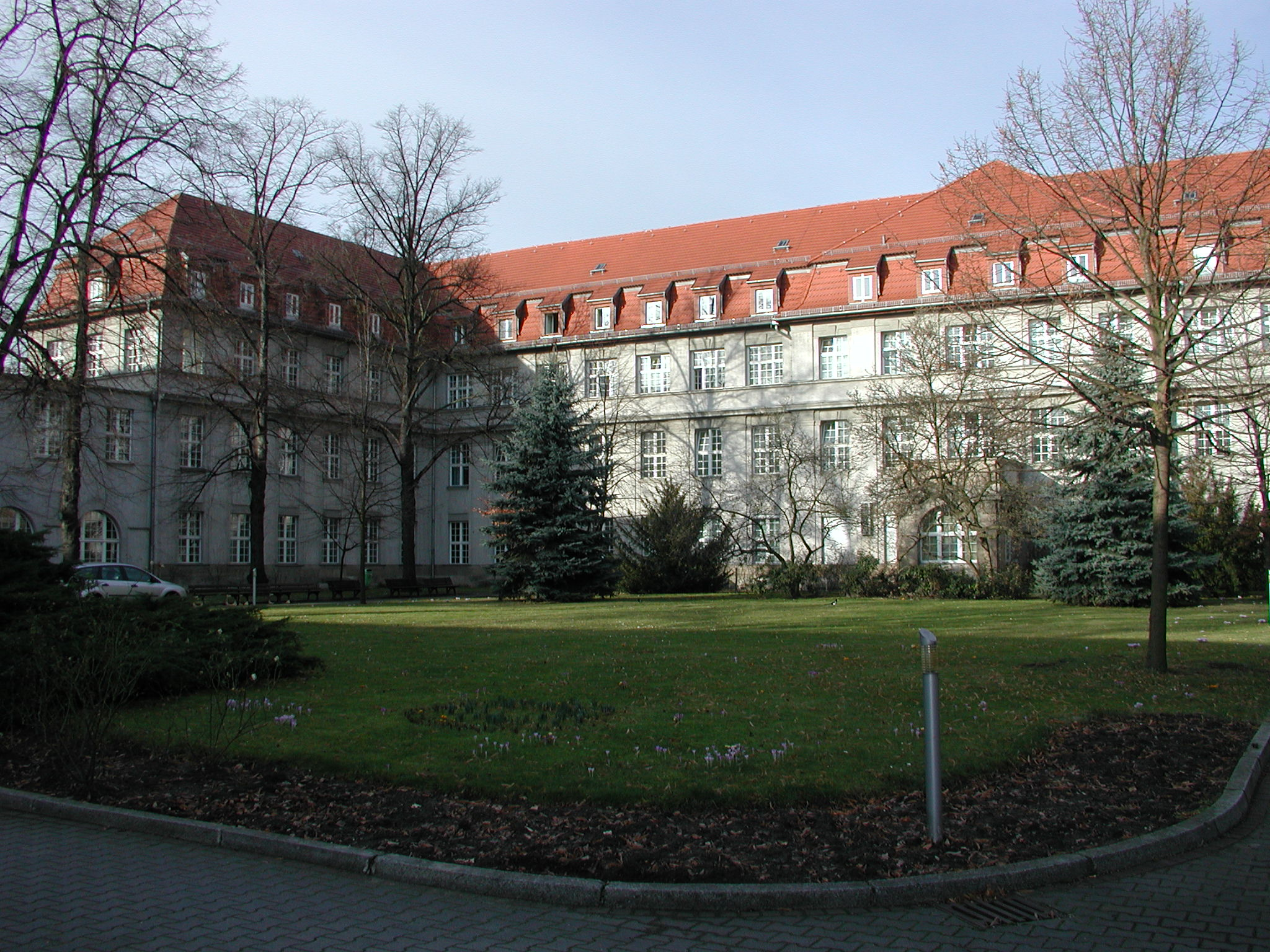 Haupttrakt des OZK (4)